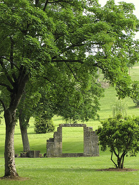 Photo: Baltasar García S